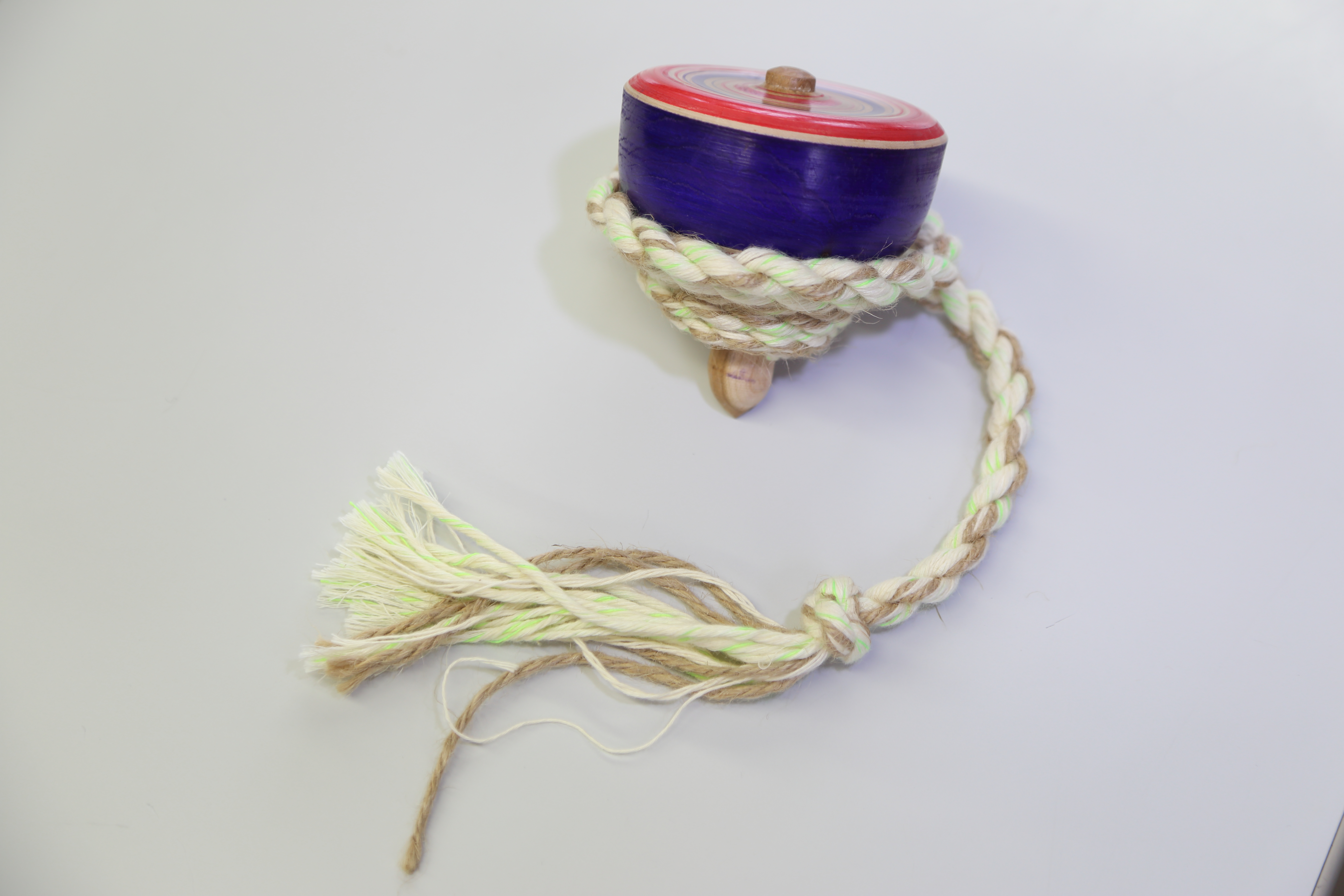 伊勢原市の伝統工芸品である「大山こま」。ひもを巻き付けた状態。